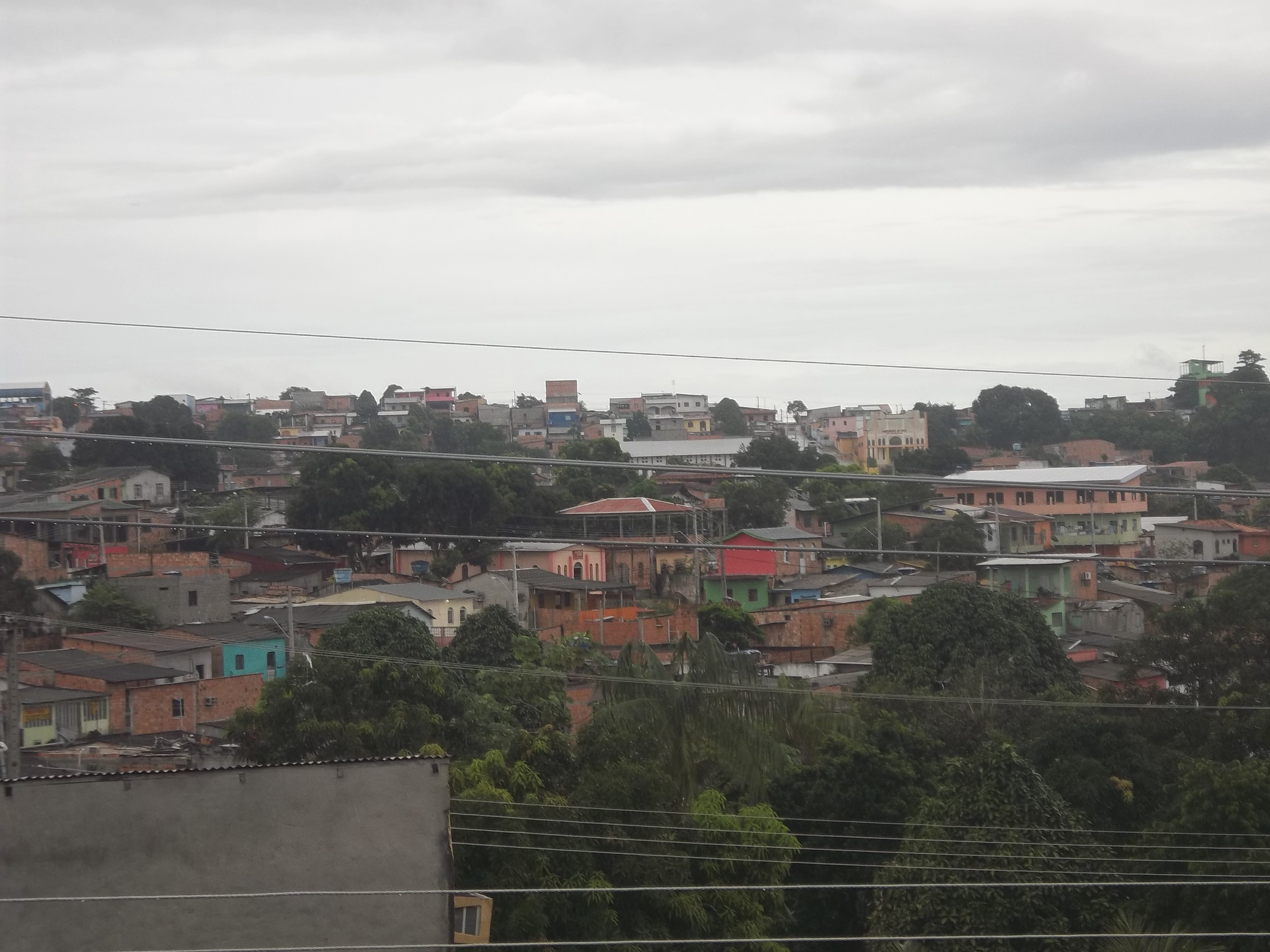 Vista parcial do bairro Amazonino Mendes, em Manaus, Amazonas, Brasil.